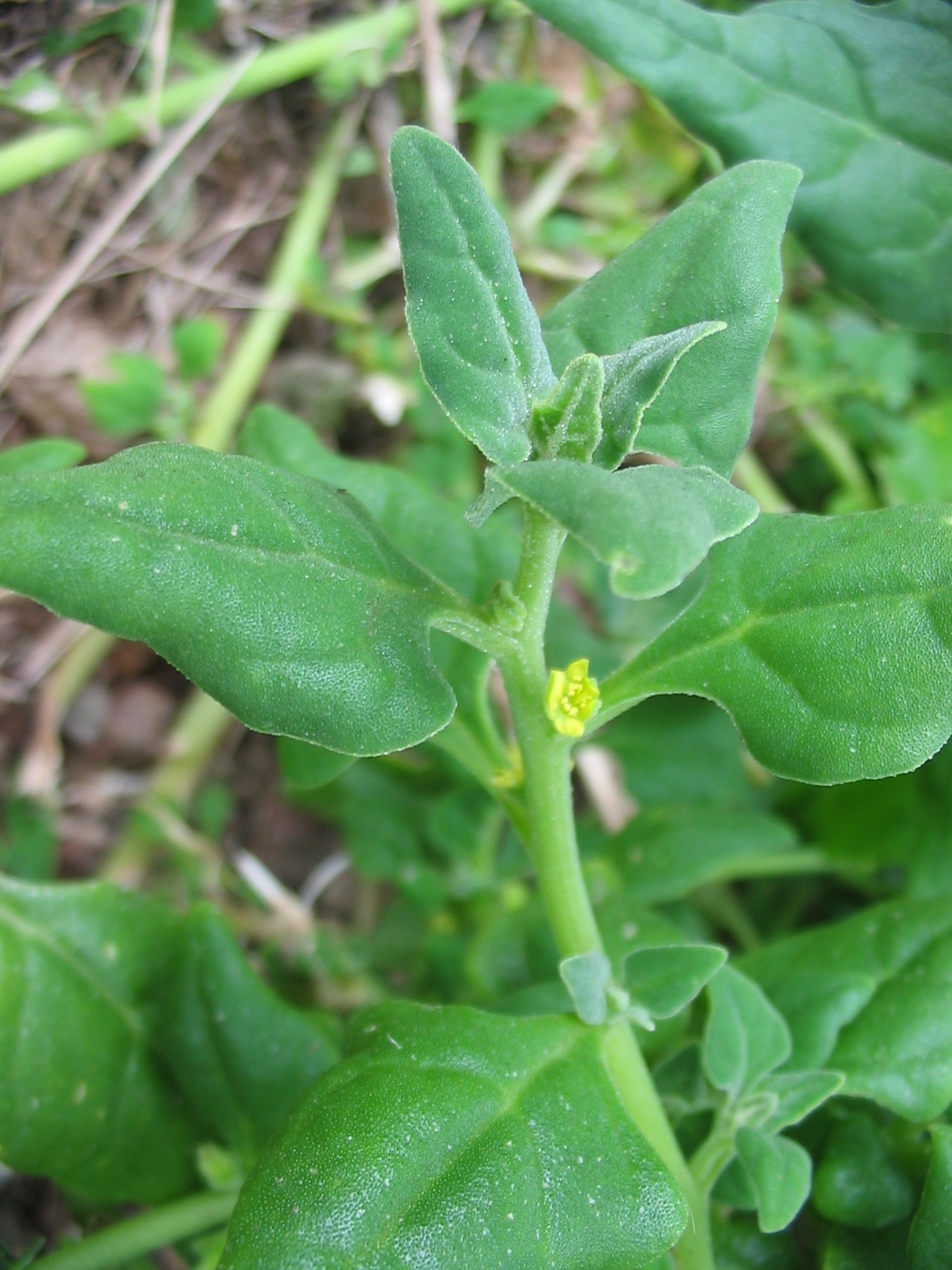 Neuseeland-Spinat (Tetragonia tetragonioides) - Blüte